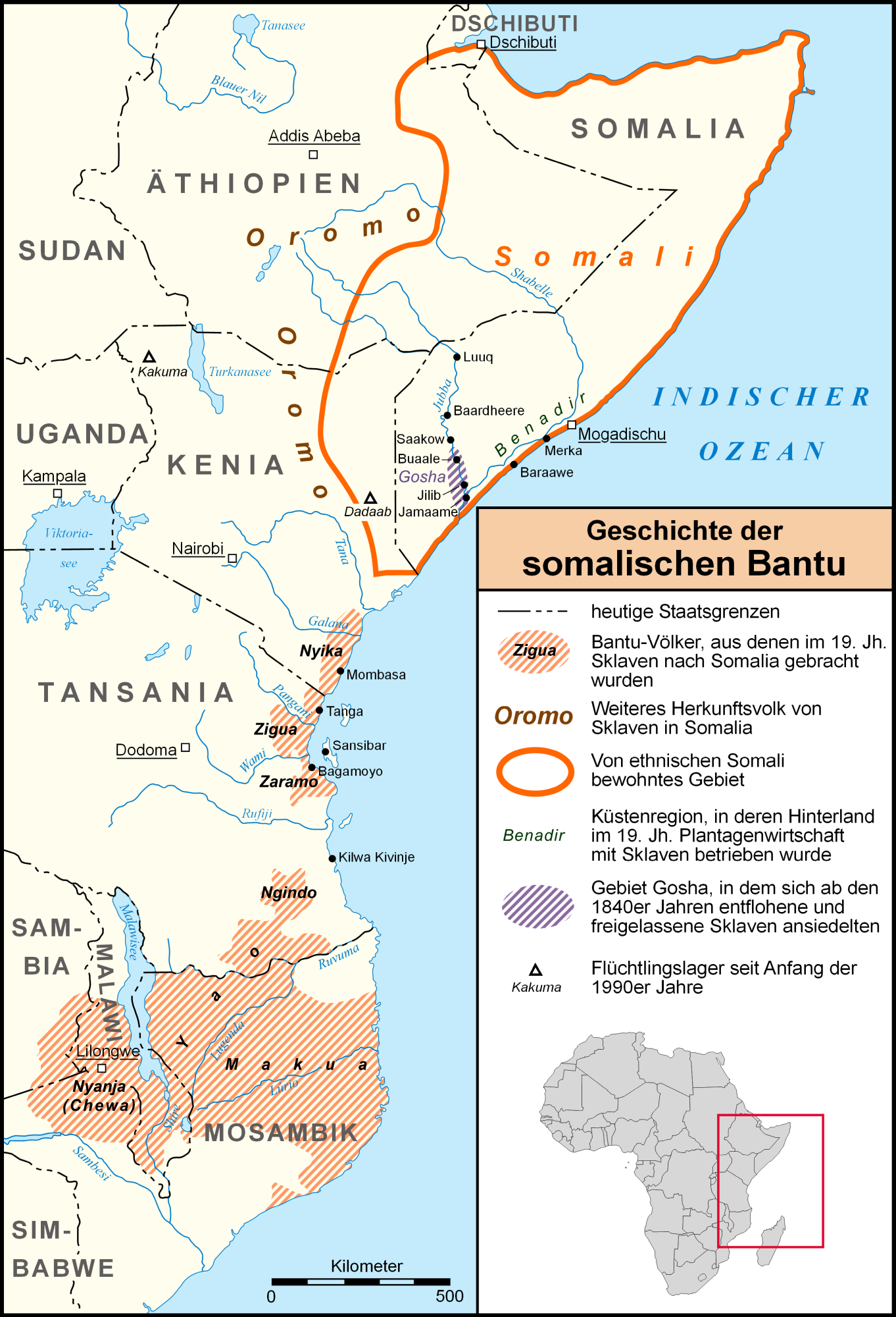 Karte zum Artikel Somalische Bantu